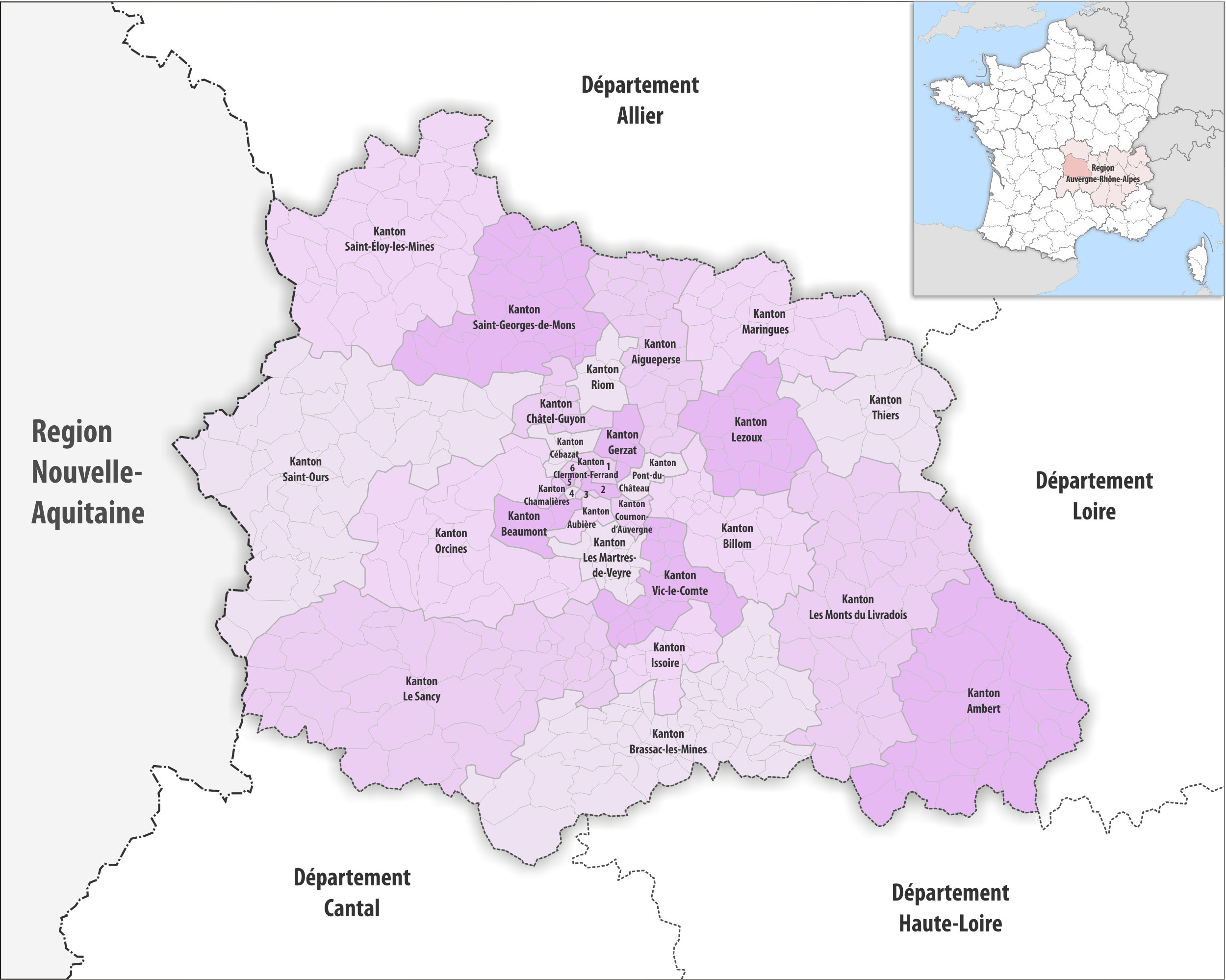 Gemeinden und Kantone im Departement Puy-de-Dôme